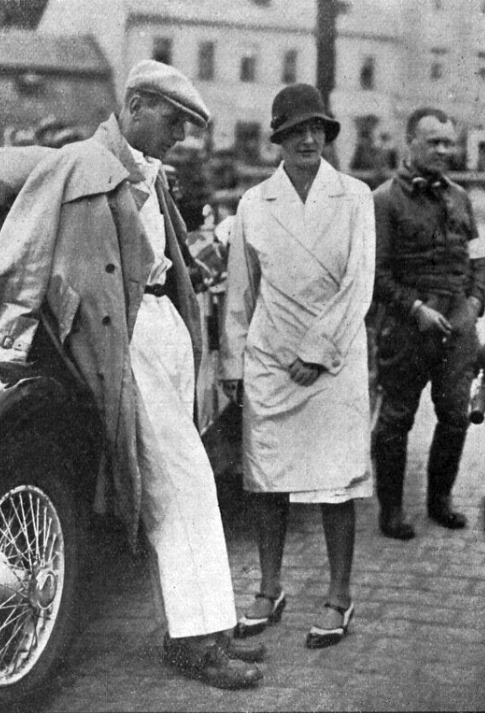 Hans Stuck a Eliška Junková před startem Zbraslav-Jíloviště (1930)